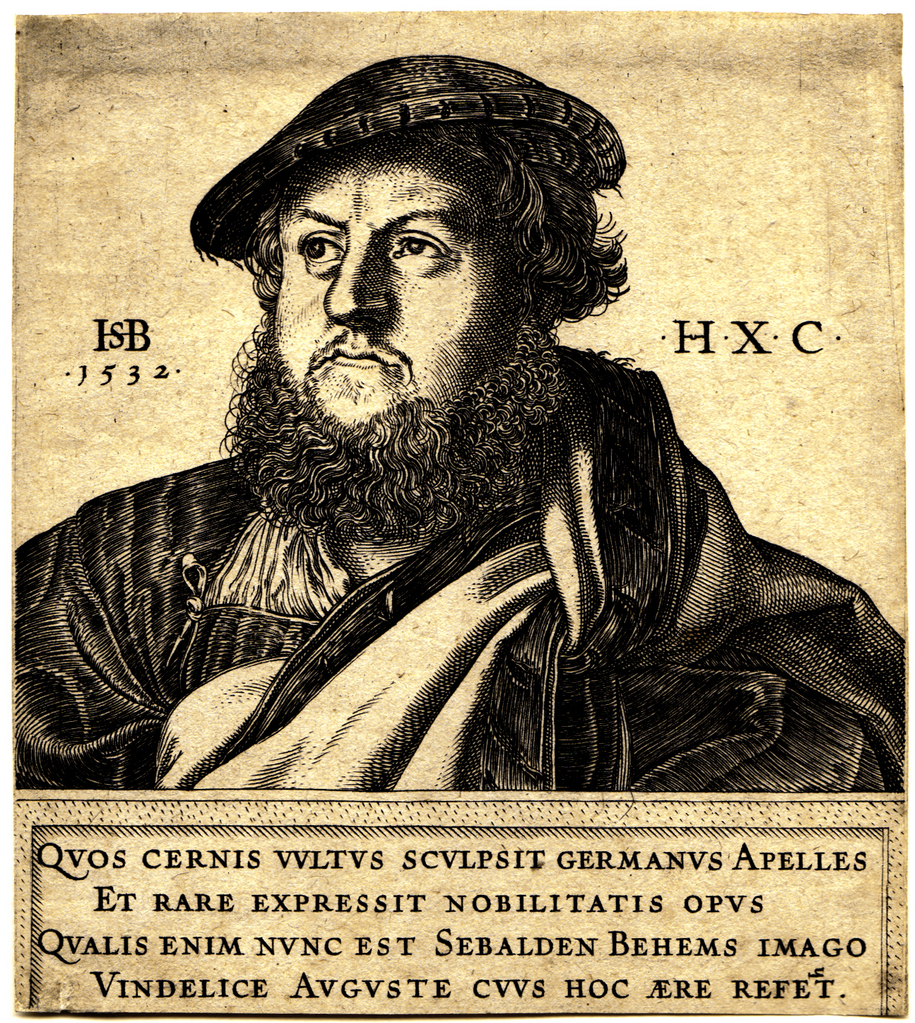 MONOGRAMMIST H.X.C. War tätig in der ersten Hälfte des 16. Jhdts.Bildnis des Hans Sebald Beham. Portrait of Hans Sebald Beham. Kupferstich nach einem 1532 entstandenen Selbstbildnisses Behams. Nagler Monogrammisten III, 1729. - Mit dem Monogrammen der Künstler, Datum “1532” und lat. Text in der Platte. Blatt: 12 x 10,7 cm. Ringsum unter Verlust des Plattenrandes geringfügig beschnitten. Schwach fleckig und mit kleinen dünnen Papierstellen an den Ecken. Sammlung Kurt Klemperer (nicht bei Lugt).